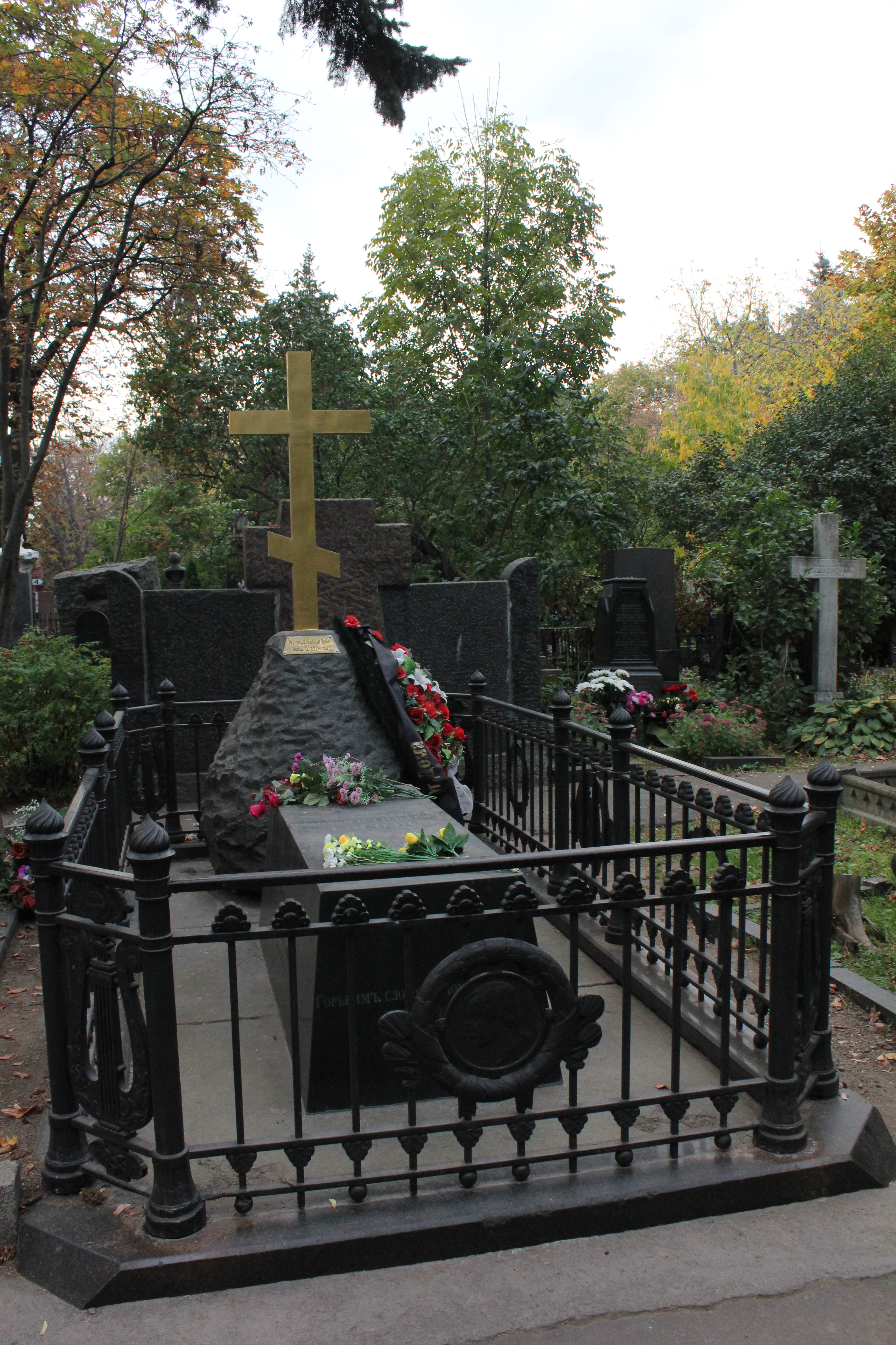 Могила Гоголя Николая Васильевича (1809-1852): Новодевичье кладбище, Хамовники, Центральный округ, Москва